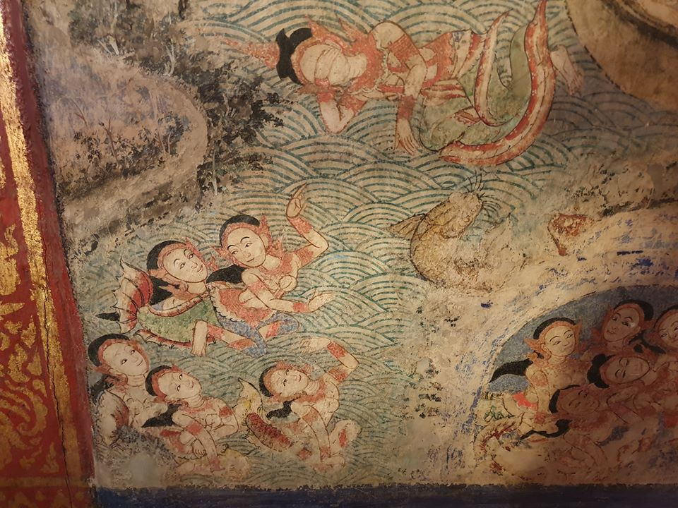 เงือกน้ำ(เงือกชนิดมีขา) จาก จิตรกรรมเรื่อง สุวรรณหงส์ วิหารลายคำ วัดพระสิงห์ อำเภอเมือง จังหวัดเชียงใหม่